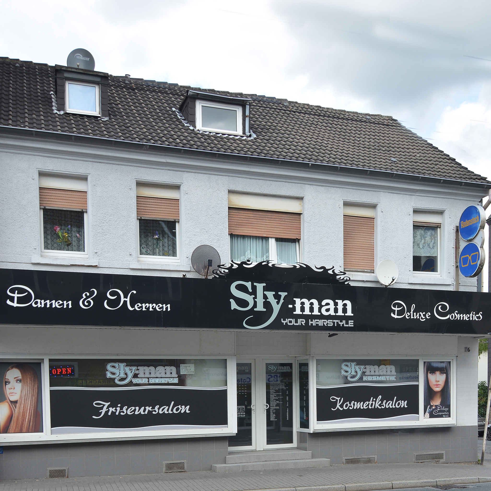 Wohnhaus eines Opfers des Naziterrors